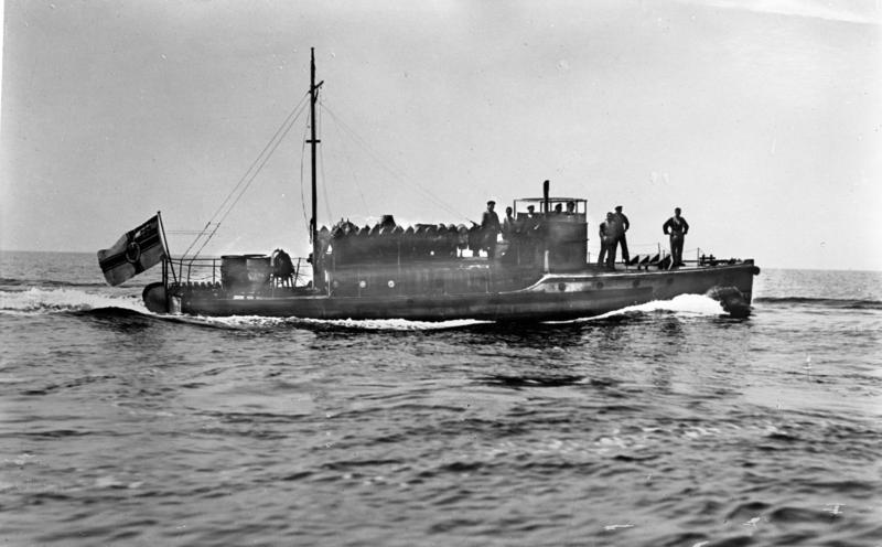 Minenräumboot im Einsatz FM 38 Motorboot; Stapellauf: 1917; als sog. Flachgehendes Minenräumboot eingesetzt